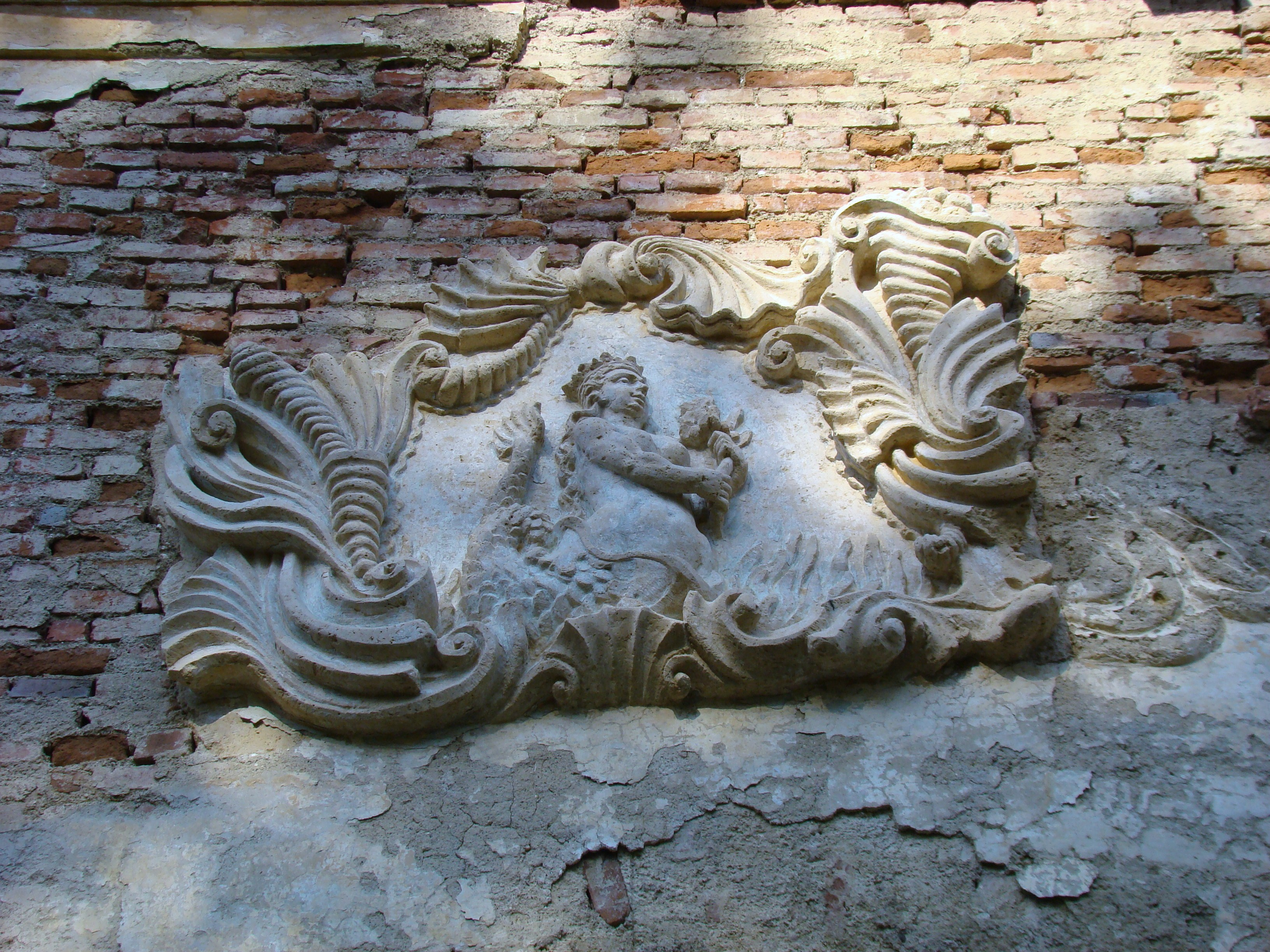 Castelul Teleki, sat COMLOD; comuna MILAŞ